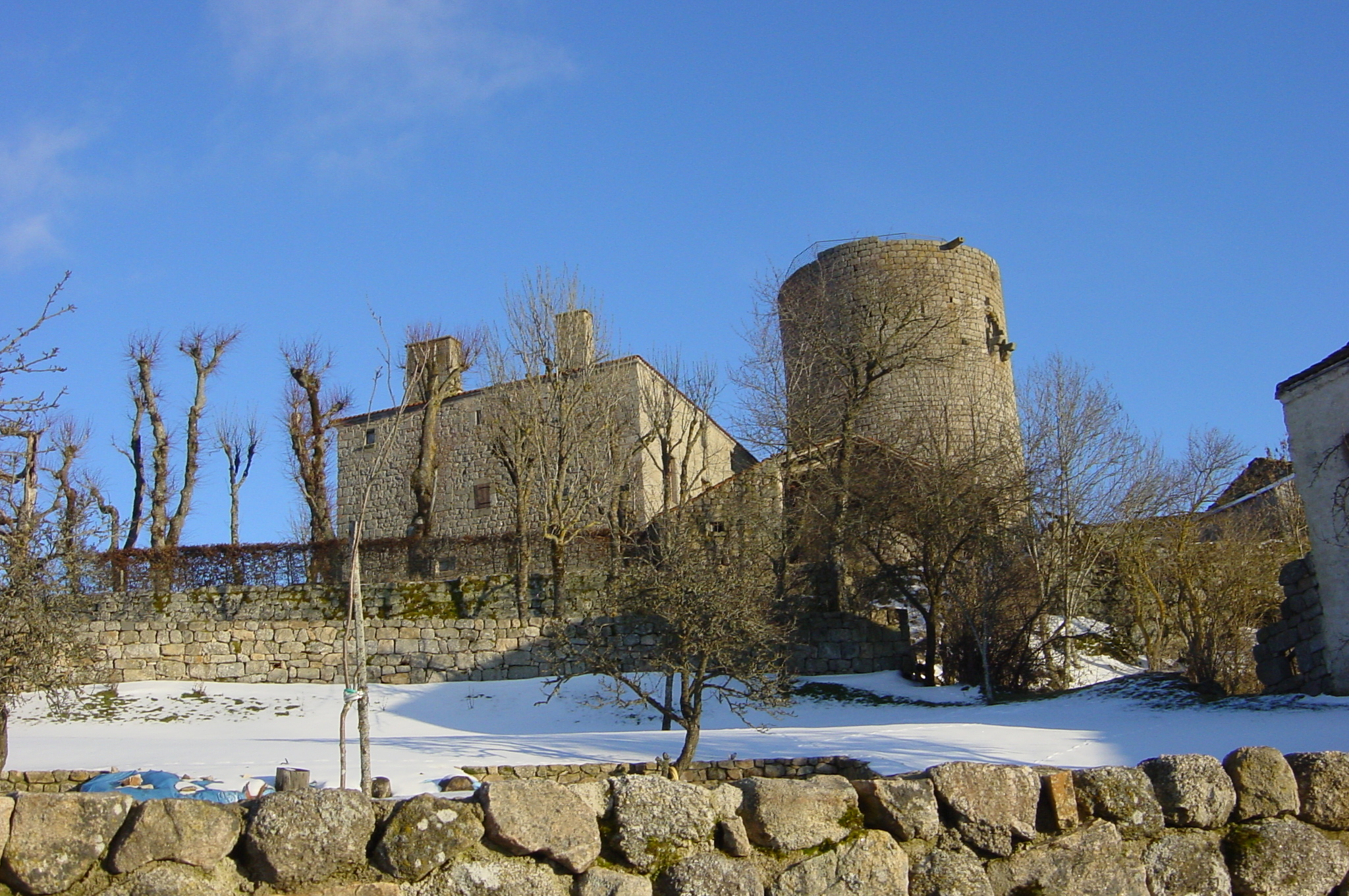 château